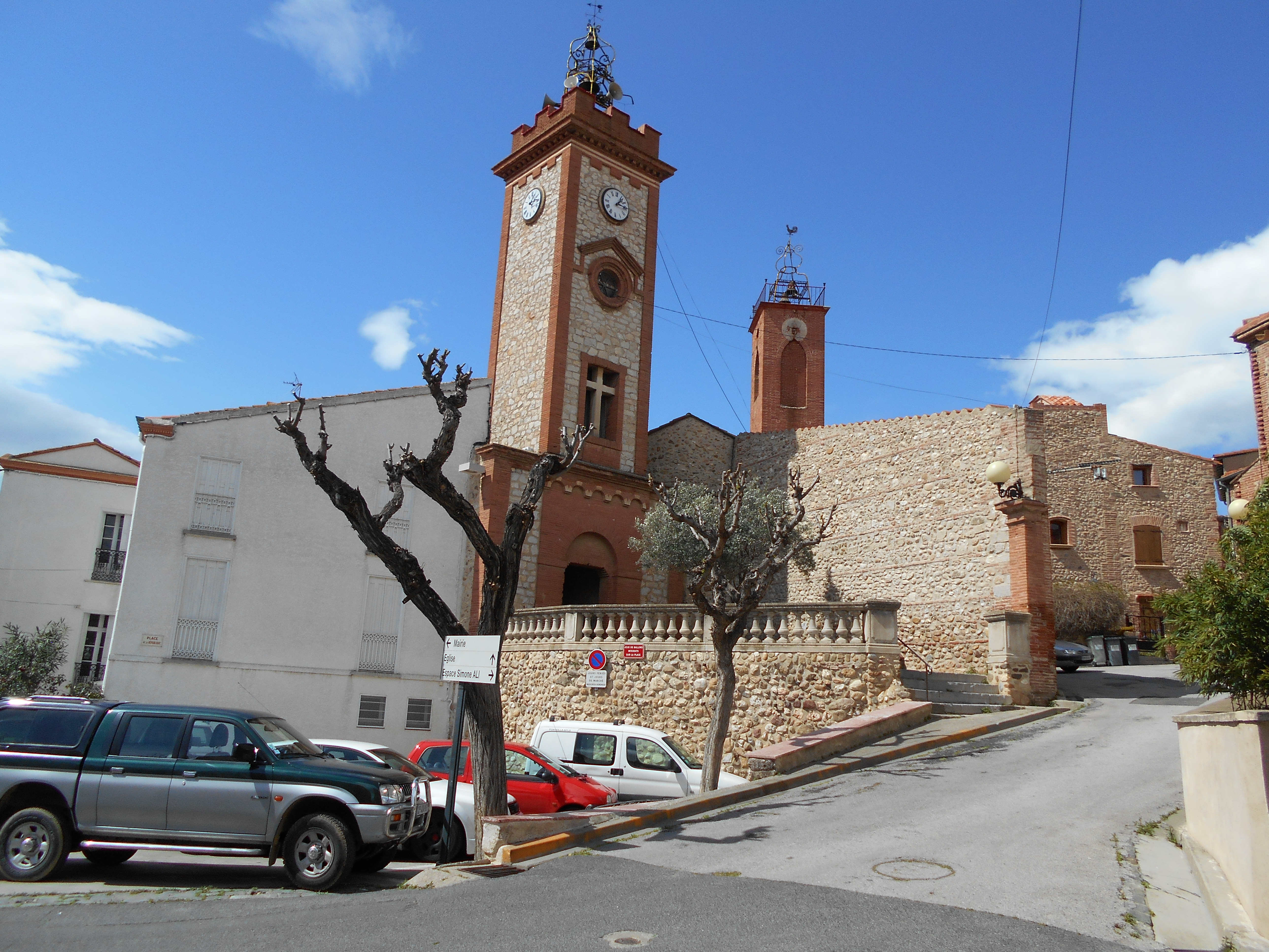 Sant Esteve de Pontellà. Els campanars 2